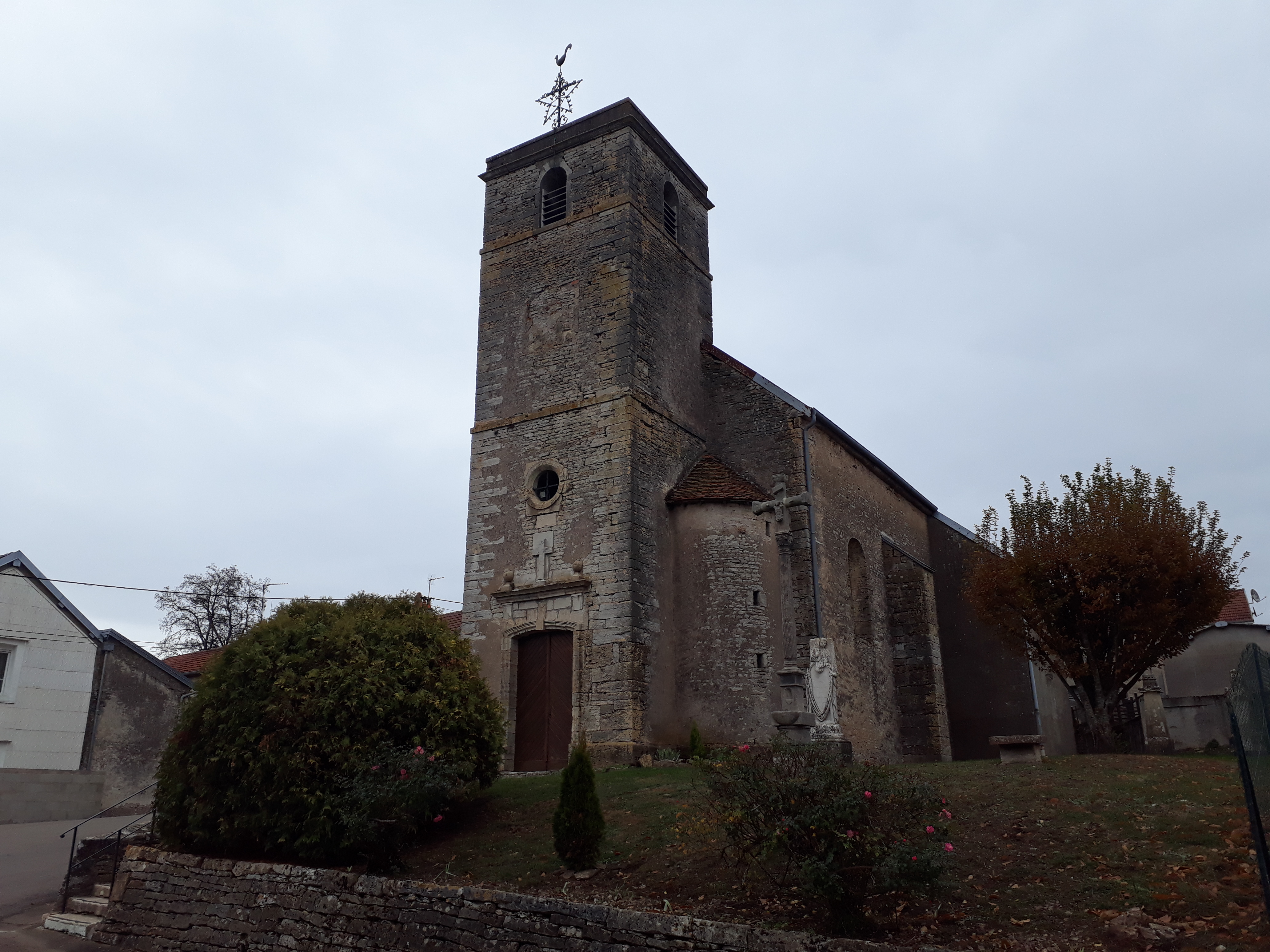 Chaux-lès-Port Eglise